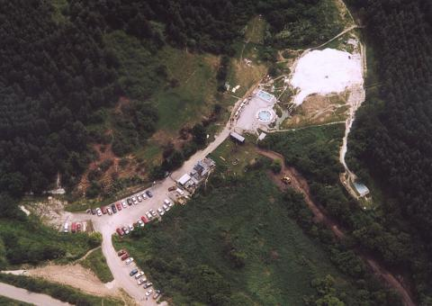 Egerszalók, Hungary, aerialphotography